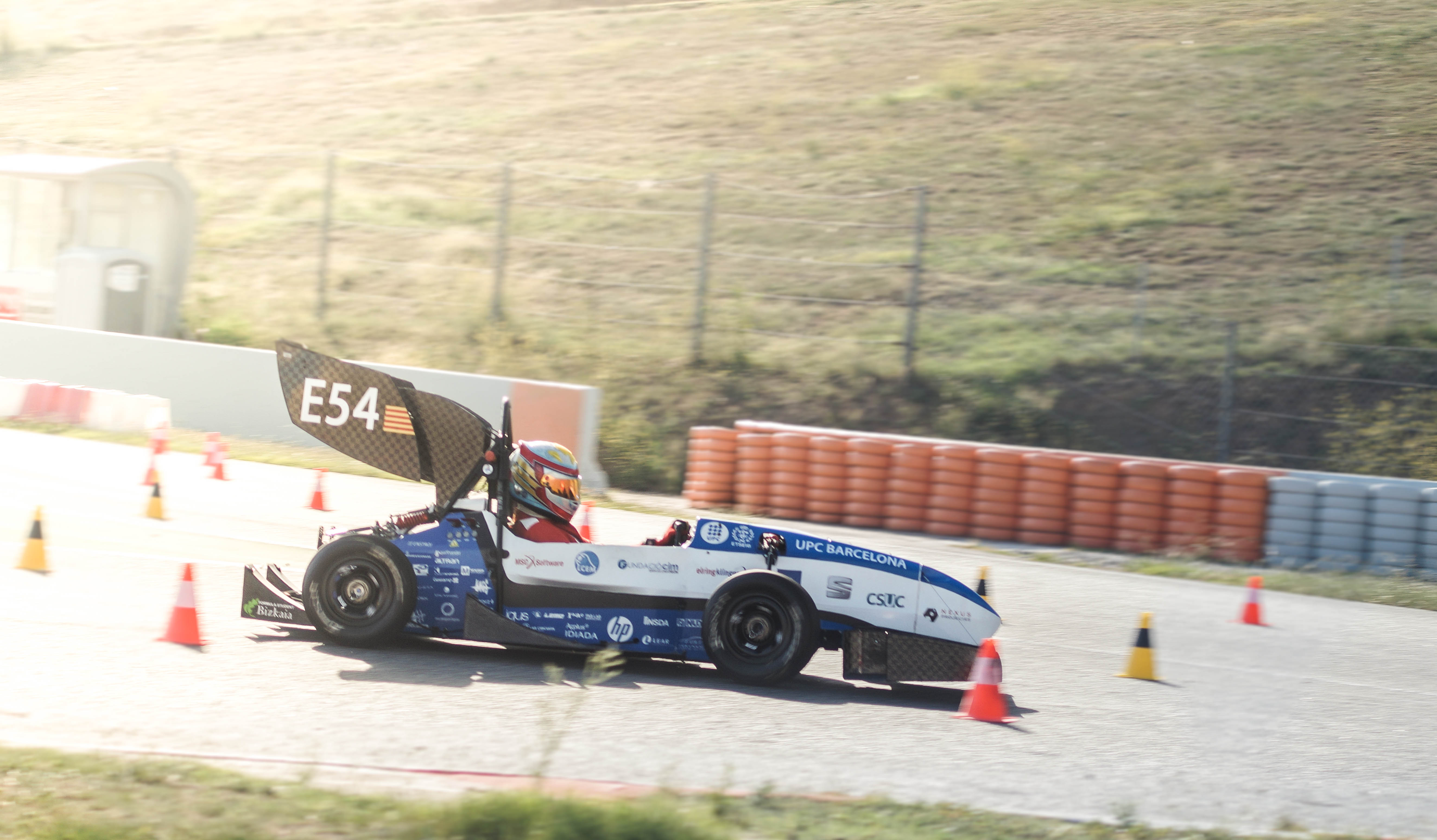 Fotografia del coche CAT08e durante las pruevas dinámicas realizadas en la participación en la Formula Student Spain